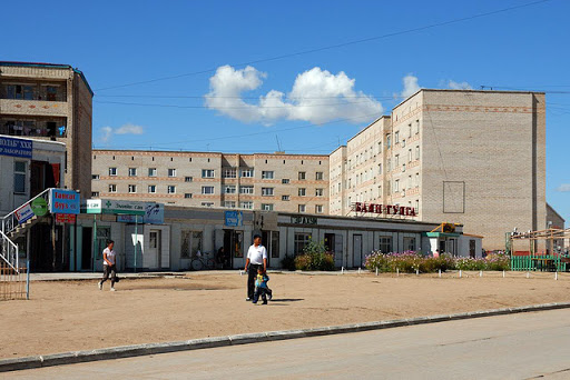 Khu nhà ở Choibalsan.